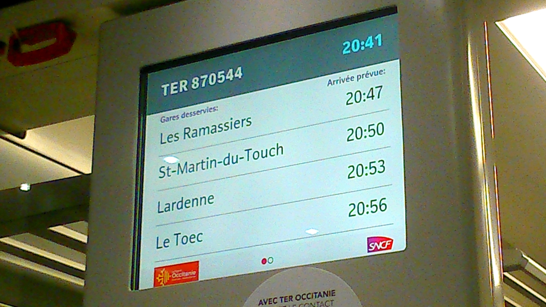 Affichage des stations dans un Régiolis dédié à la ligne C des trains urbains de Toulouse